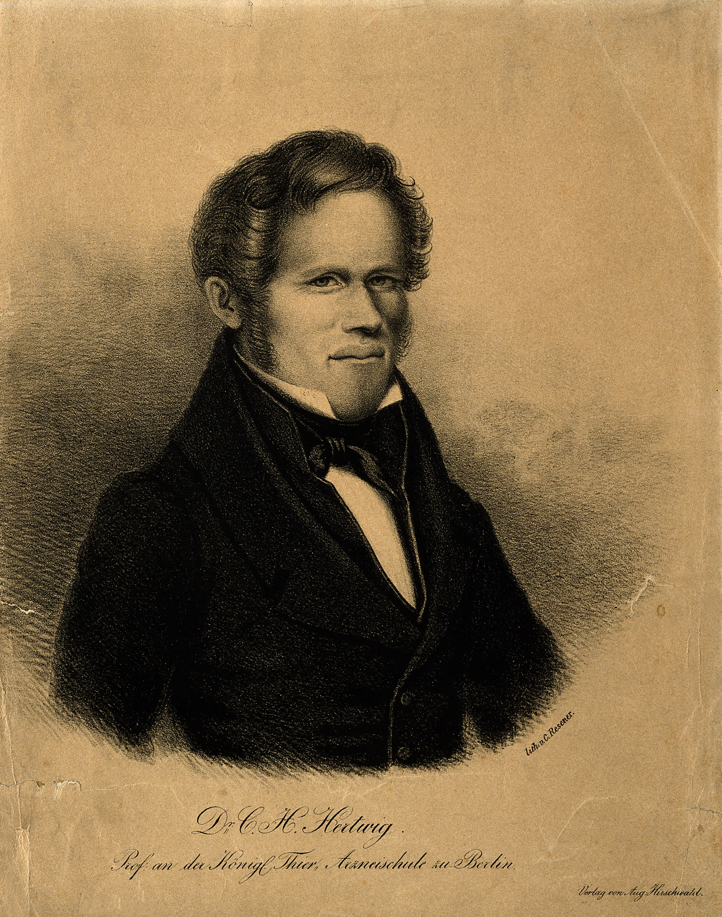 Genre/Technique: Portrait prints. Lithographs. Subject name: Hertwig, C. H. (Carl Heinrich), 1798-1881.